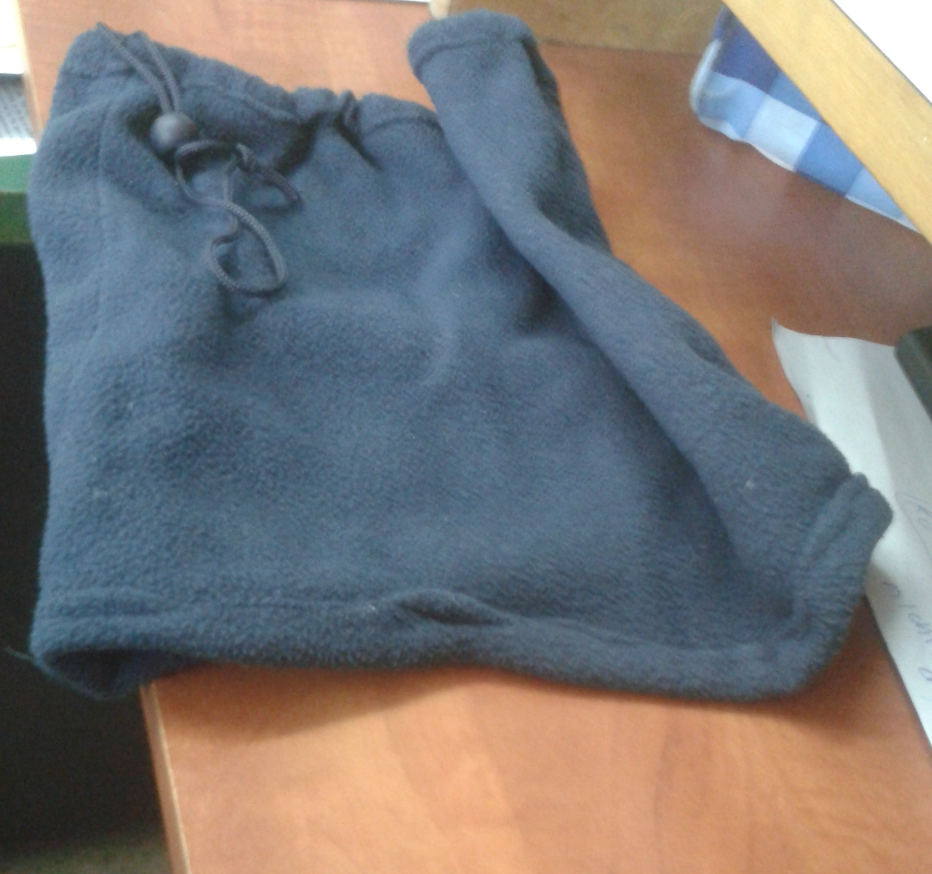 a simple neck gaiter